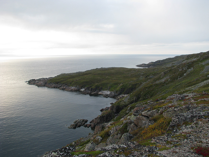 Мыс Наталий Наволок